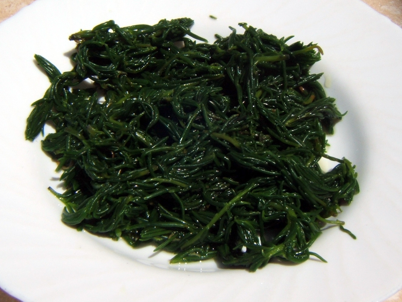 salissia lessa (o Salicornia fruticosa? o asparago di mare?)